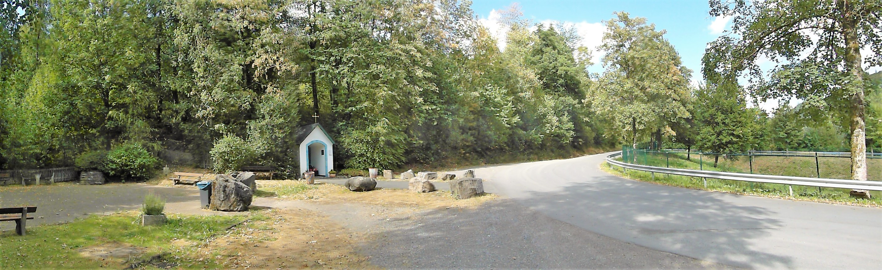 Bildstock Madonna der Straße nahe Oedingen (Baujahr ca. 1880)